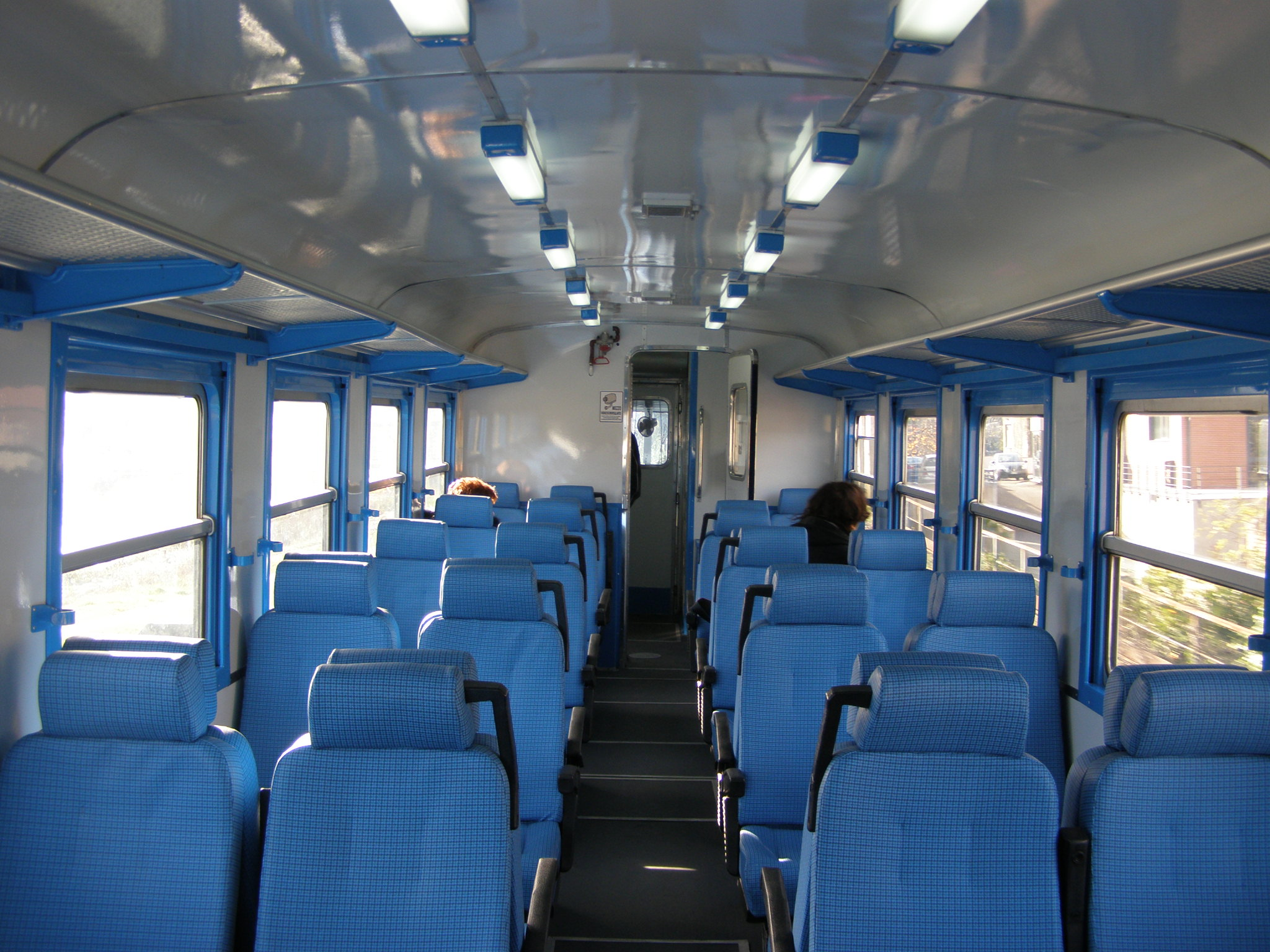 Interni delle M2.200 Mv ristrutturate sulla linea Cosenza-Catanzaro